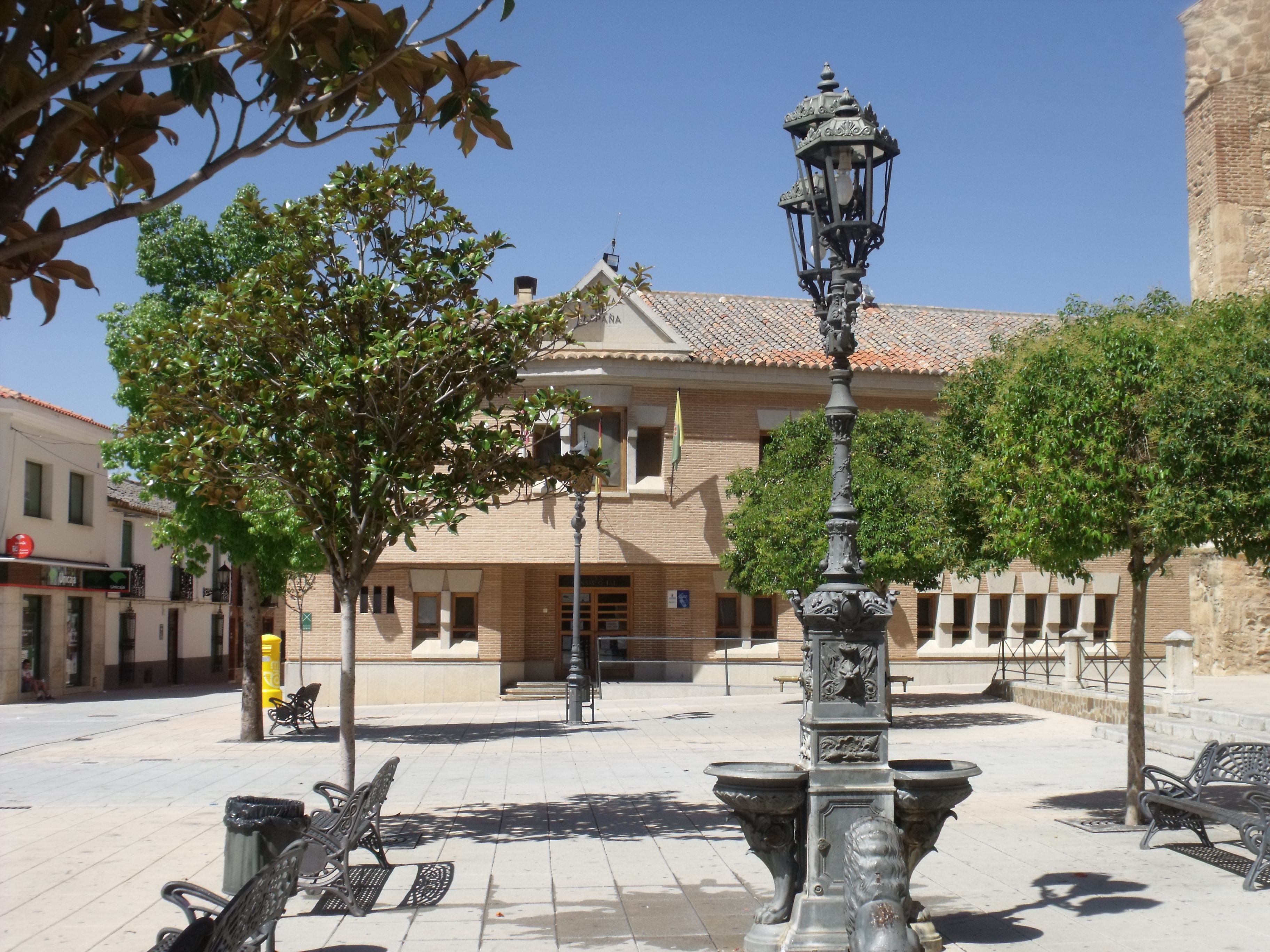 Ayuntamiento